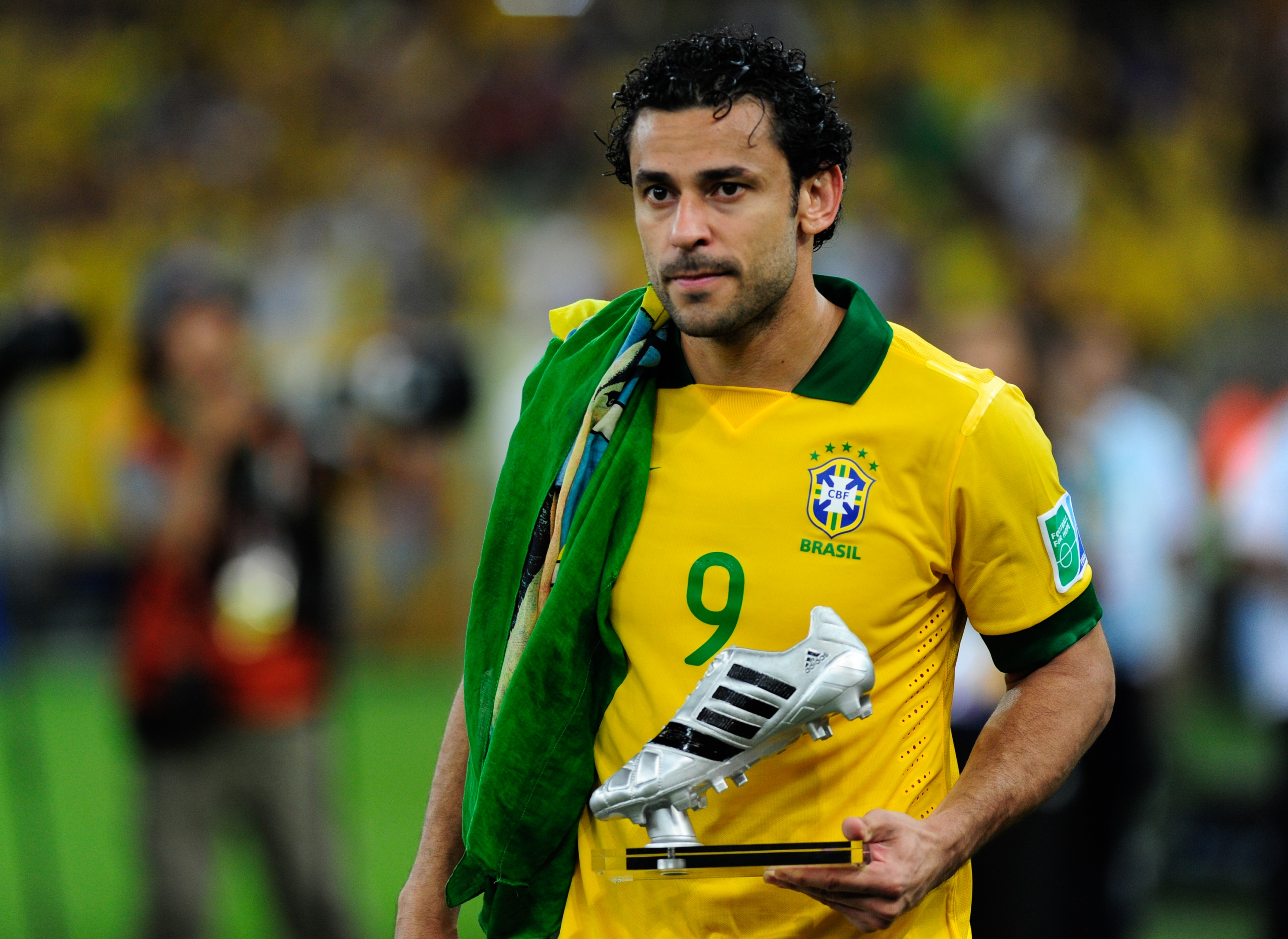 No Estádio do Maracanã, Brasil e Espanha disputam a taça da Copa das Confederações de 2013.